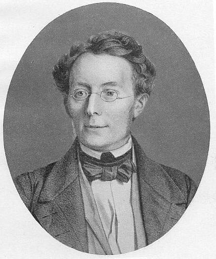 Friedrich Wilhelm Ritschl (1806—1876), deutscher klassischer Philologe. Nach einem Stich von Adolf Hohneck